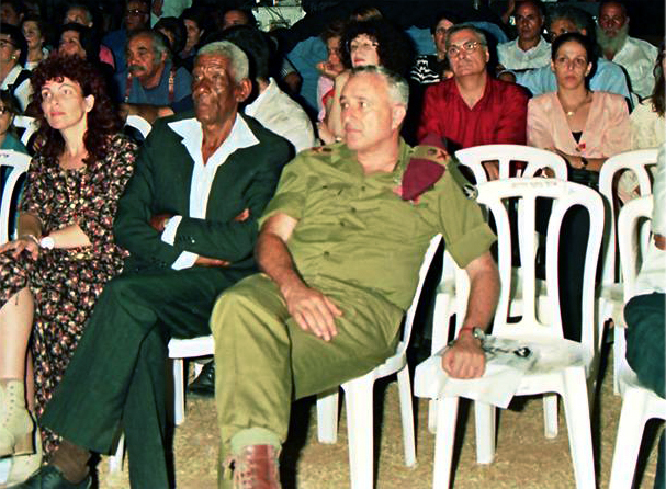 אמנון ליפקין שחק בכנס סיירת שקד לדורותיו